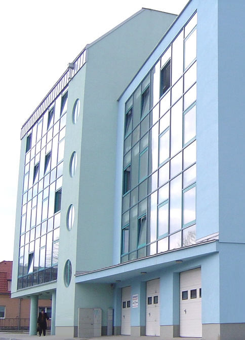 Consumer Finance Holding budova